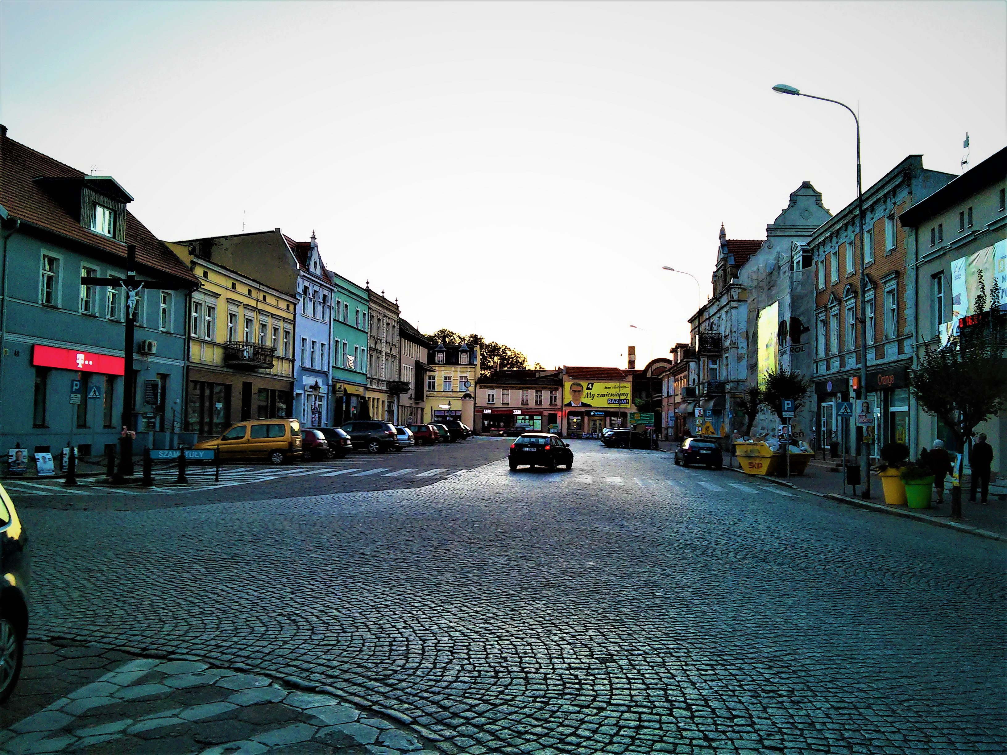 Rynek